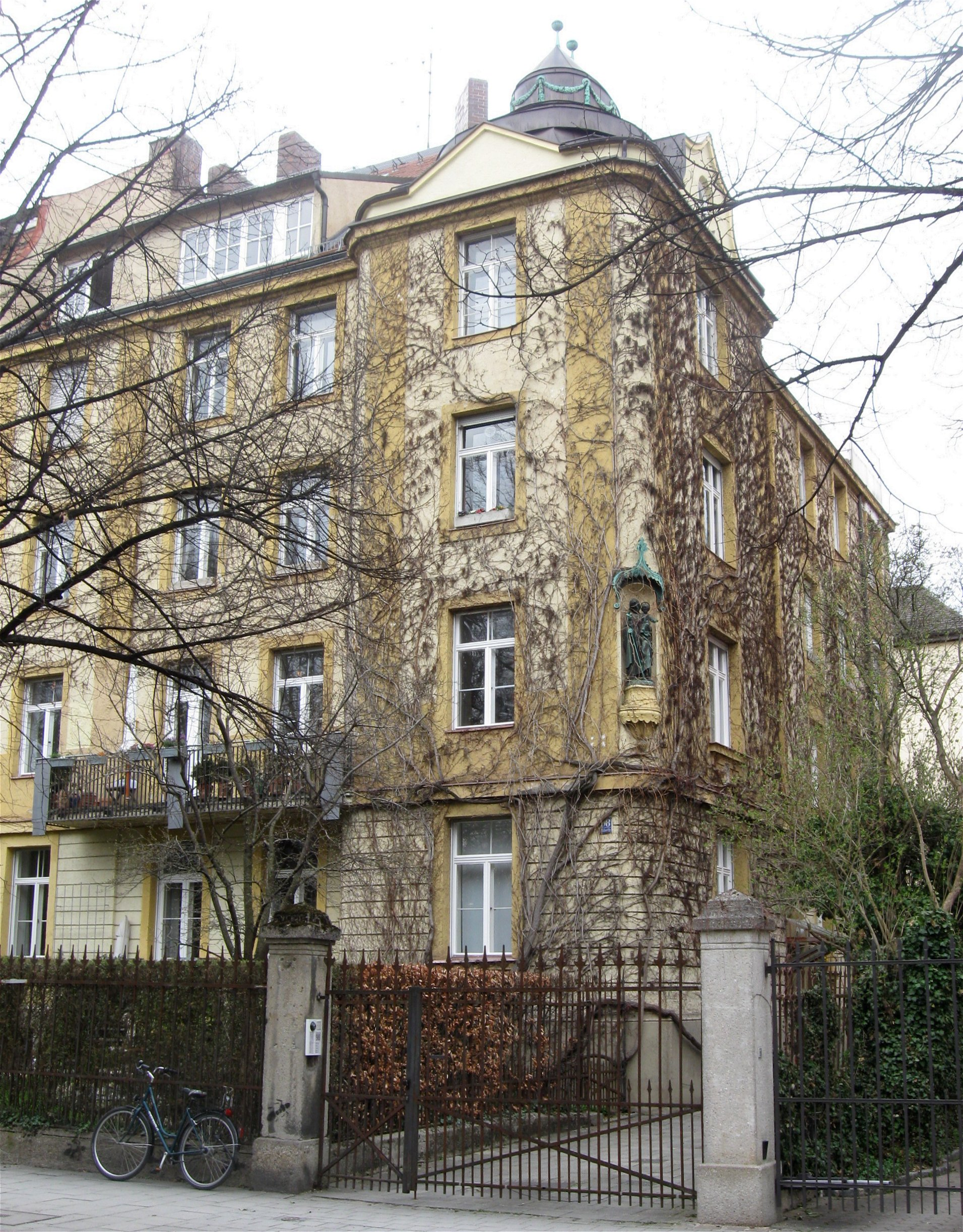 Adalbertstraße 98; Mietshaus, historisierend, mit Eckkuppel und Josephsfigur, 1898 von Martin Dülfer.